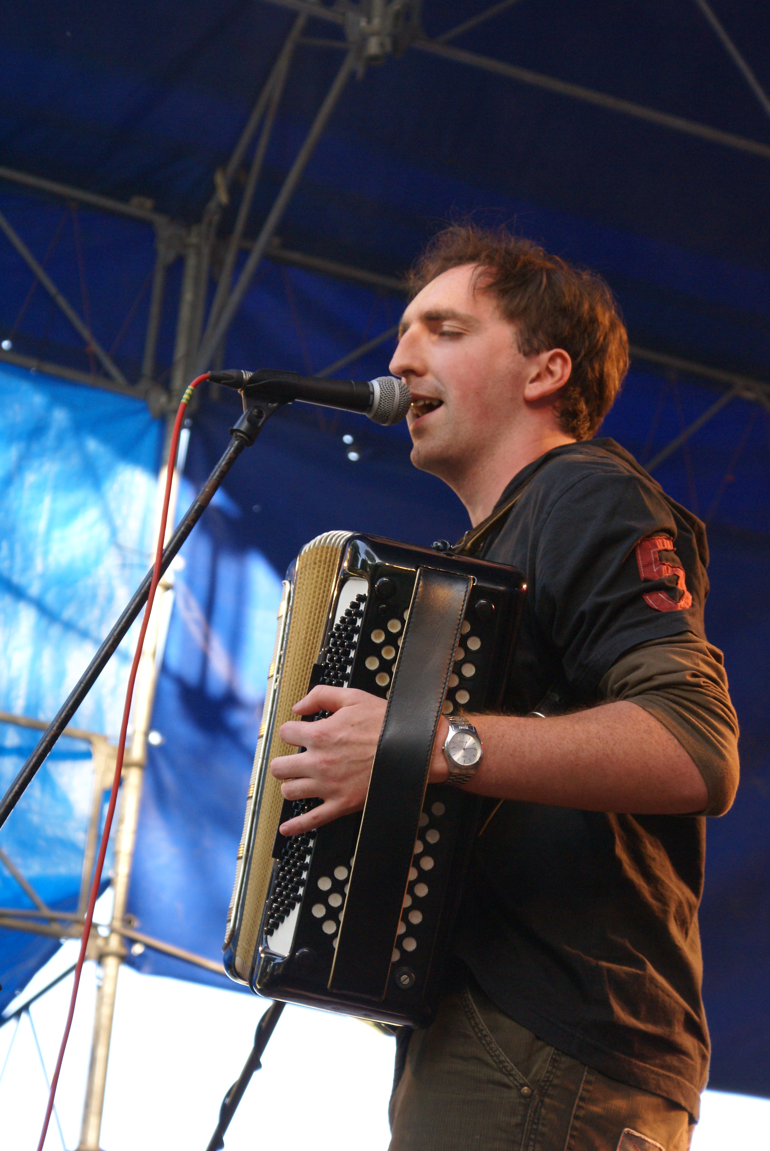 Grzegorz Chudy podczas koncertu Beltaine w Tychach.